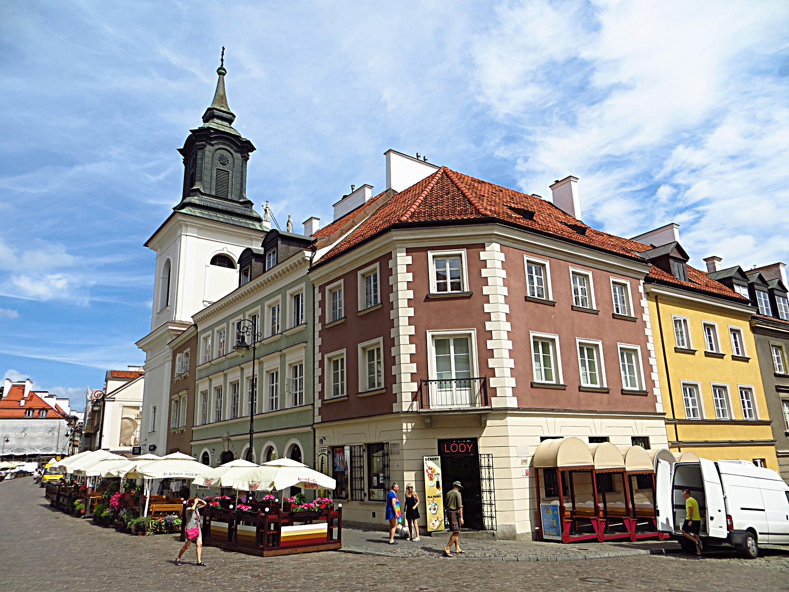 Freta